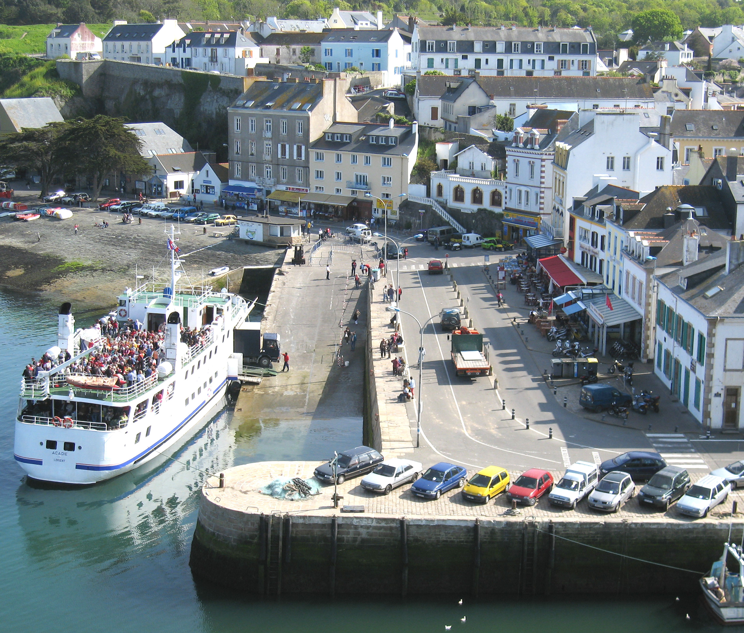 Le Ferry Acadie de la SMN et canot de sauvetage au Palais à Belle-Île-en-Mer. Lieu: Belle Ile, Bretagne, France